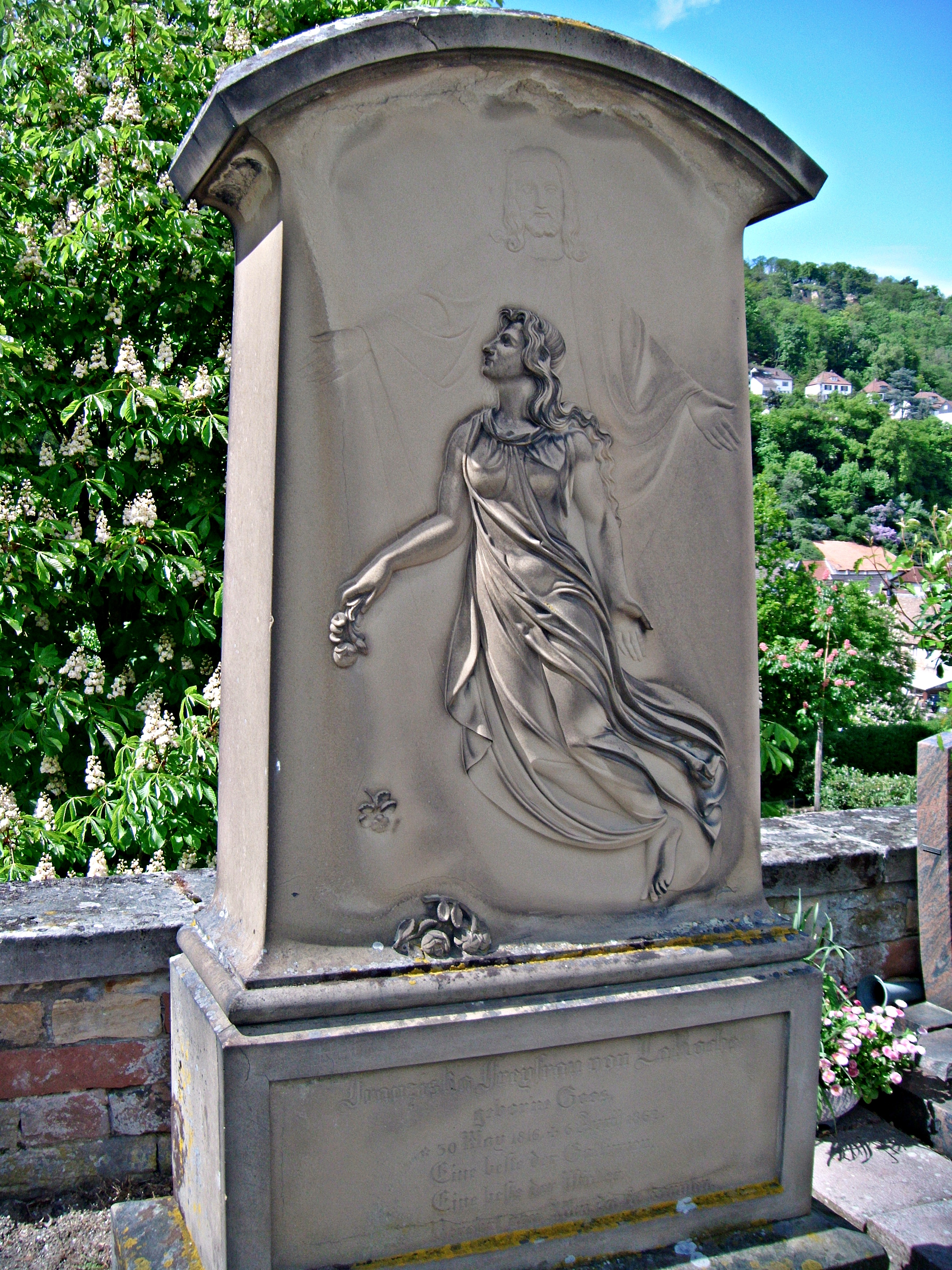 Grabstein der Freifrau Franziska de La Roche geb. Goos (1816-1862), Friedhof Bad Dürkheim, Rheinland-Pfalz. Bildhauer (signiert): Wilhelm Hornberger (1819-1882)